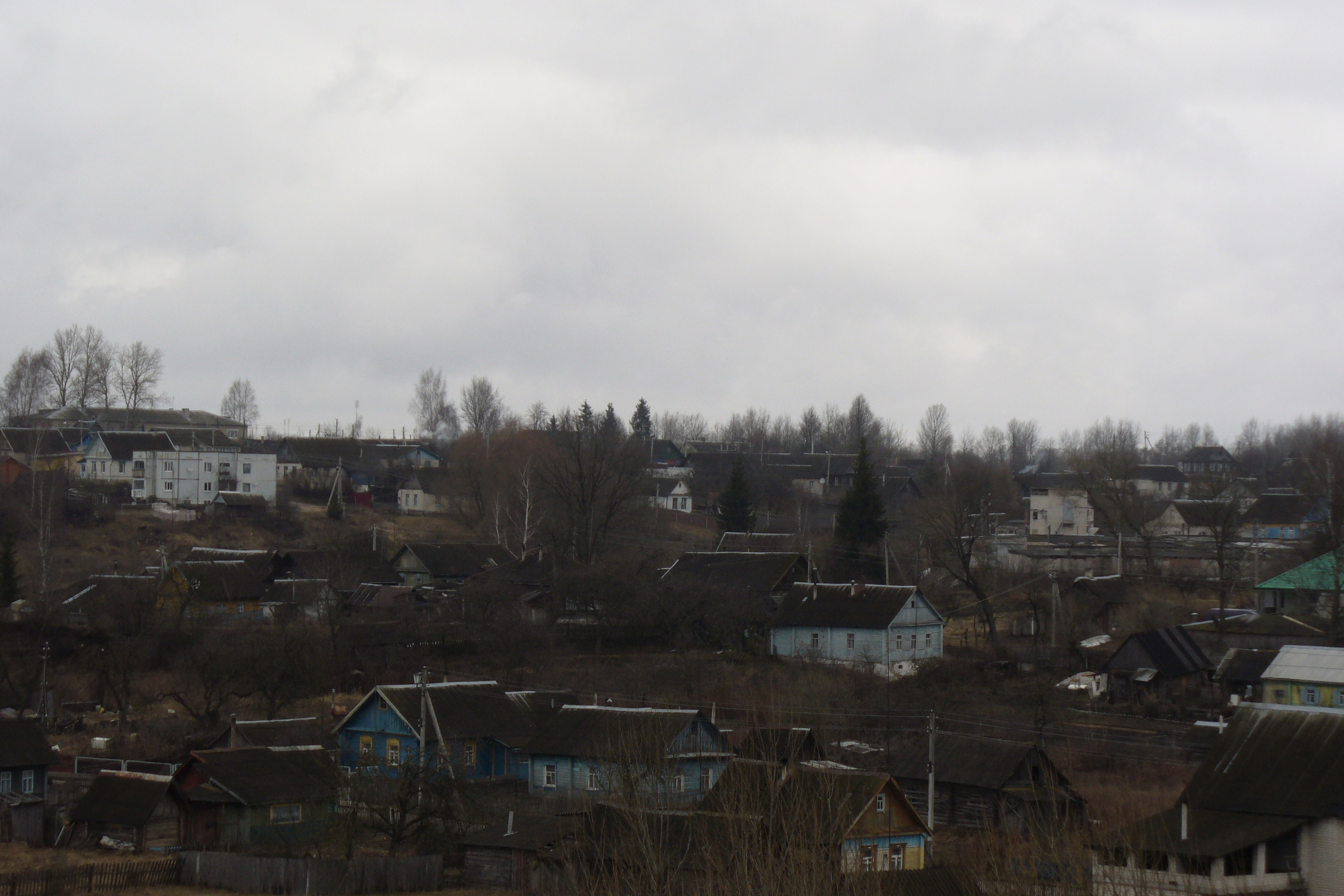 Город Городок Витебской обл. Вид на старую часть города. Апрель 2010 г.